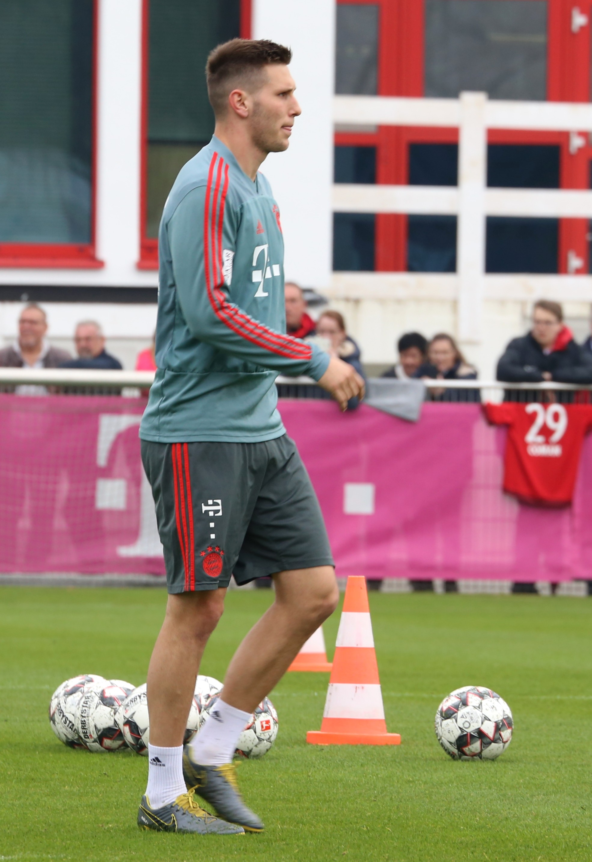 Niklas Süle, am 10. April 2019 beim Training auf dem Gelände des FC Bayern München